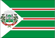 BAndeira do Município de Toledo - PR